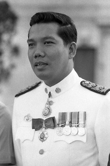 Thai interior minister Samak Sundaravej (Sunthoravej), ca. 1976, by Norman Peagam